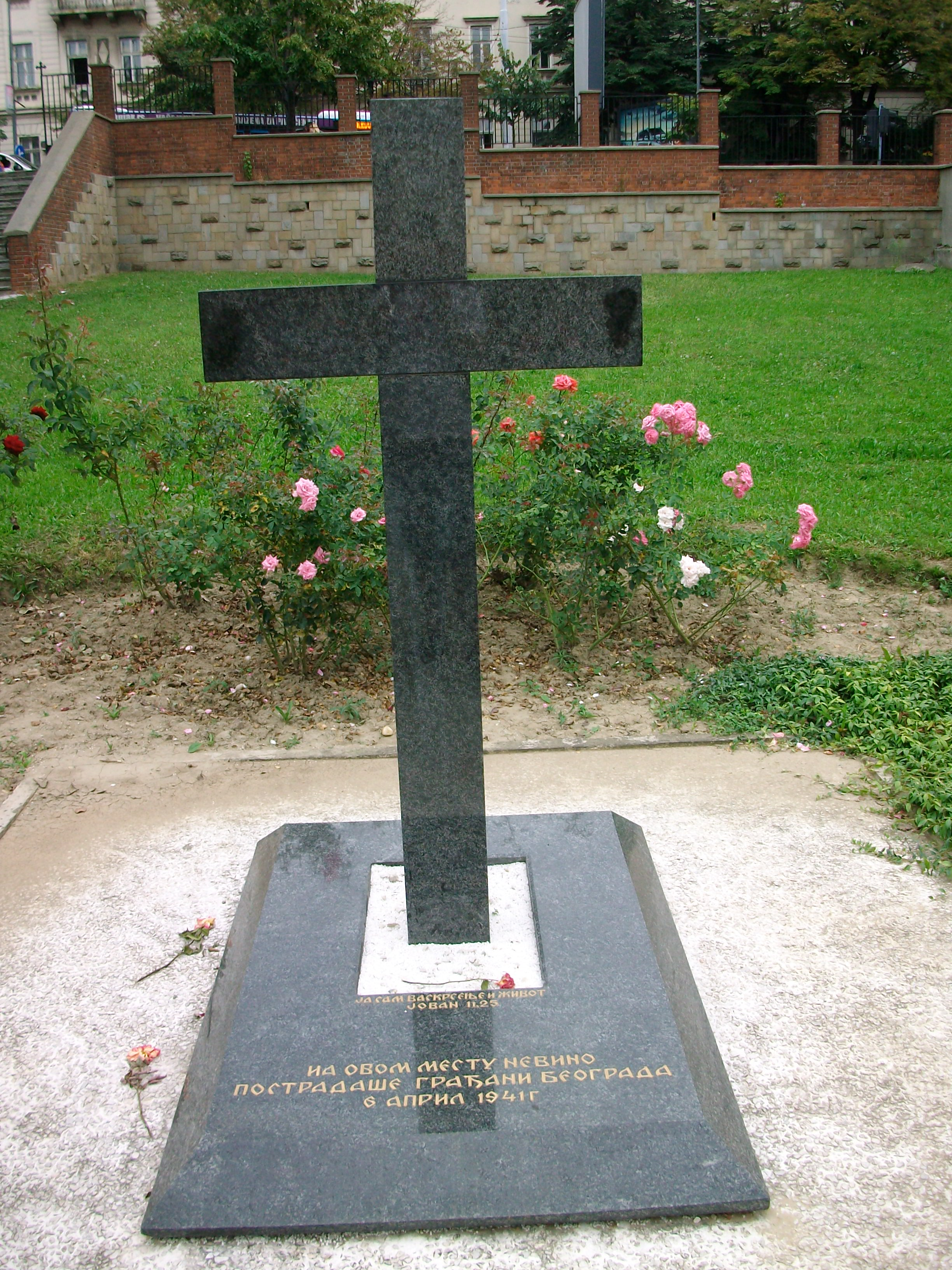 Српски (ћирилица): Споменик погинулим у Вазнесењској цркви за време бомбардовања Београда 1941.